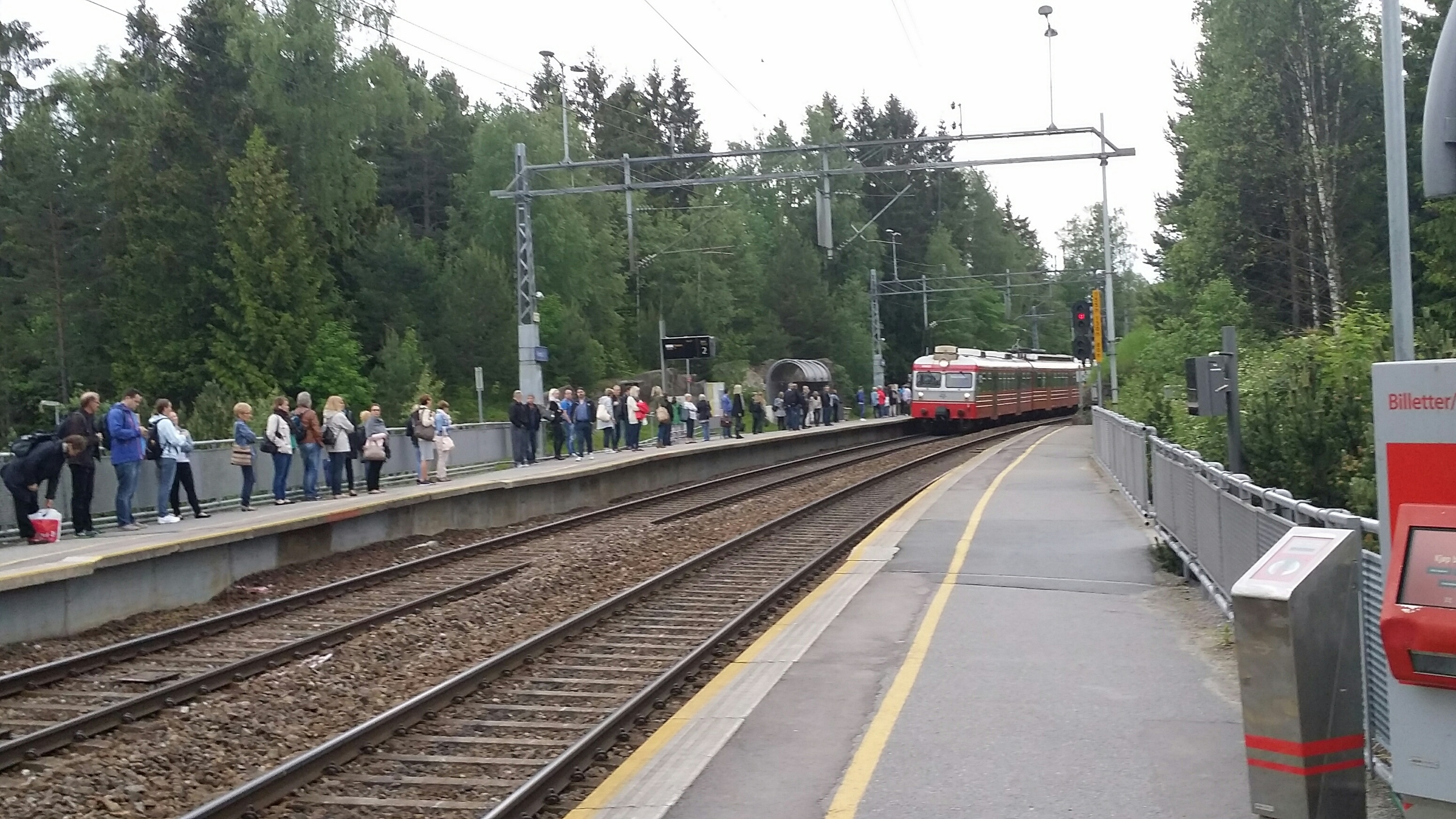 Vevelstad holdeplass, Østfoldbanen